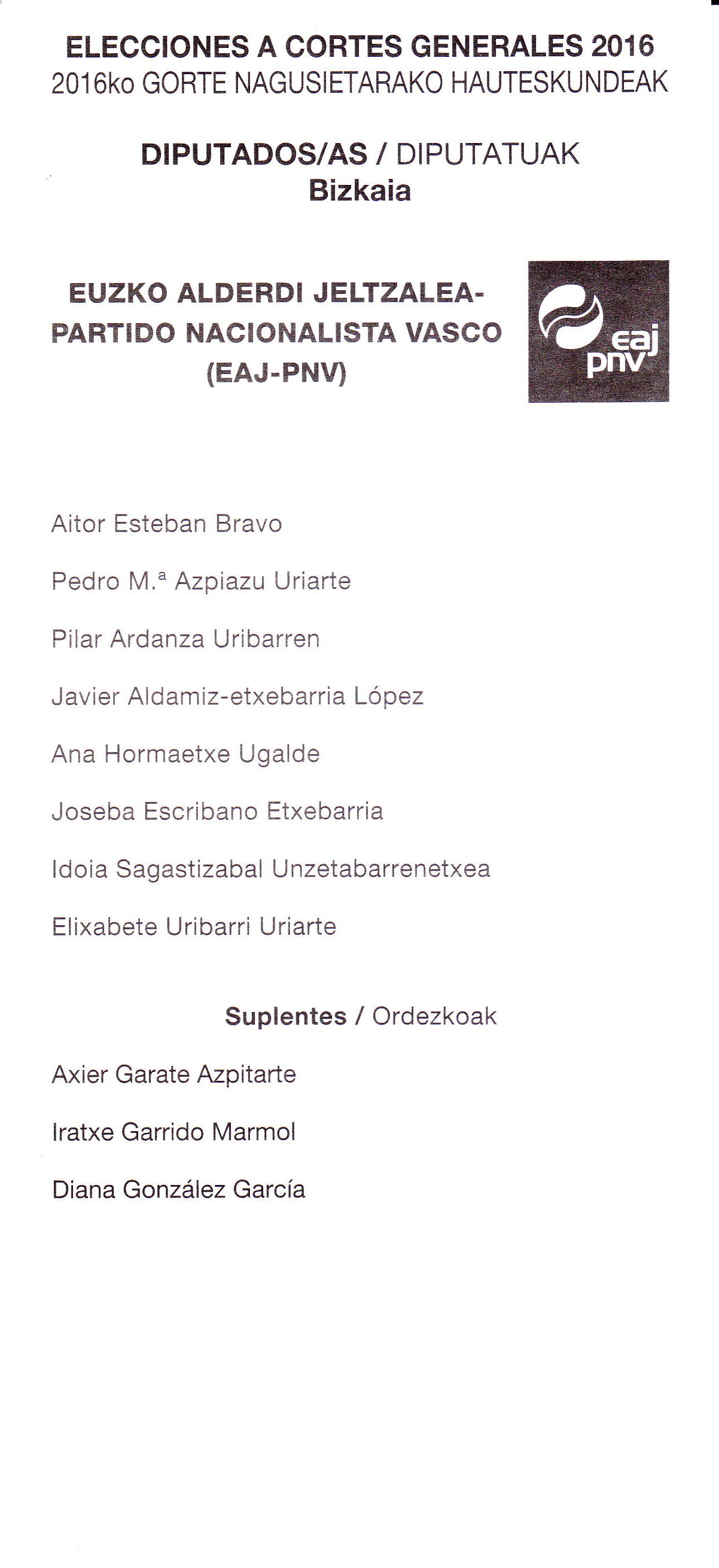 Papeleta al Congreso de los Diputados del partido "Euzko Alderdi Jertzalea-Partido Nacionalista Vasco" (PNV) por Bizkaia en las elecciones generales del 26 de junio de 2016 en España.